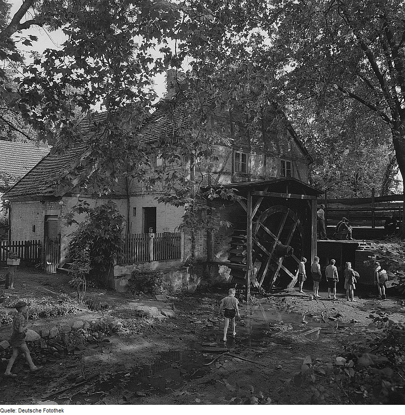 Original image description from the Deutsche Fotothek Schwerin. Schleifmühle am Faulen See (Museum für Naturstein-, Edelstein- und Mineralienbearbeitung)